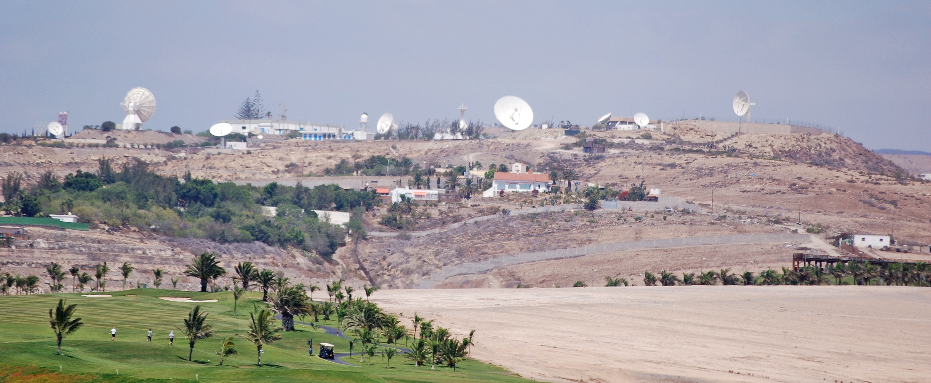 Erdfunkstelle nahe Maspalomas, Gran Canaria